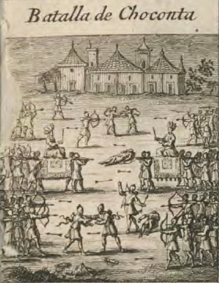 Batalla de Chocontá. Grabado en la "Historia general de las conquistas del Nuevo Reino de Granada" (Amberes, Juan Baptista Verdussen, 1688), de Lucas Fernández de Piedrahita.